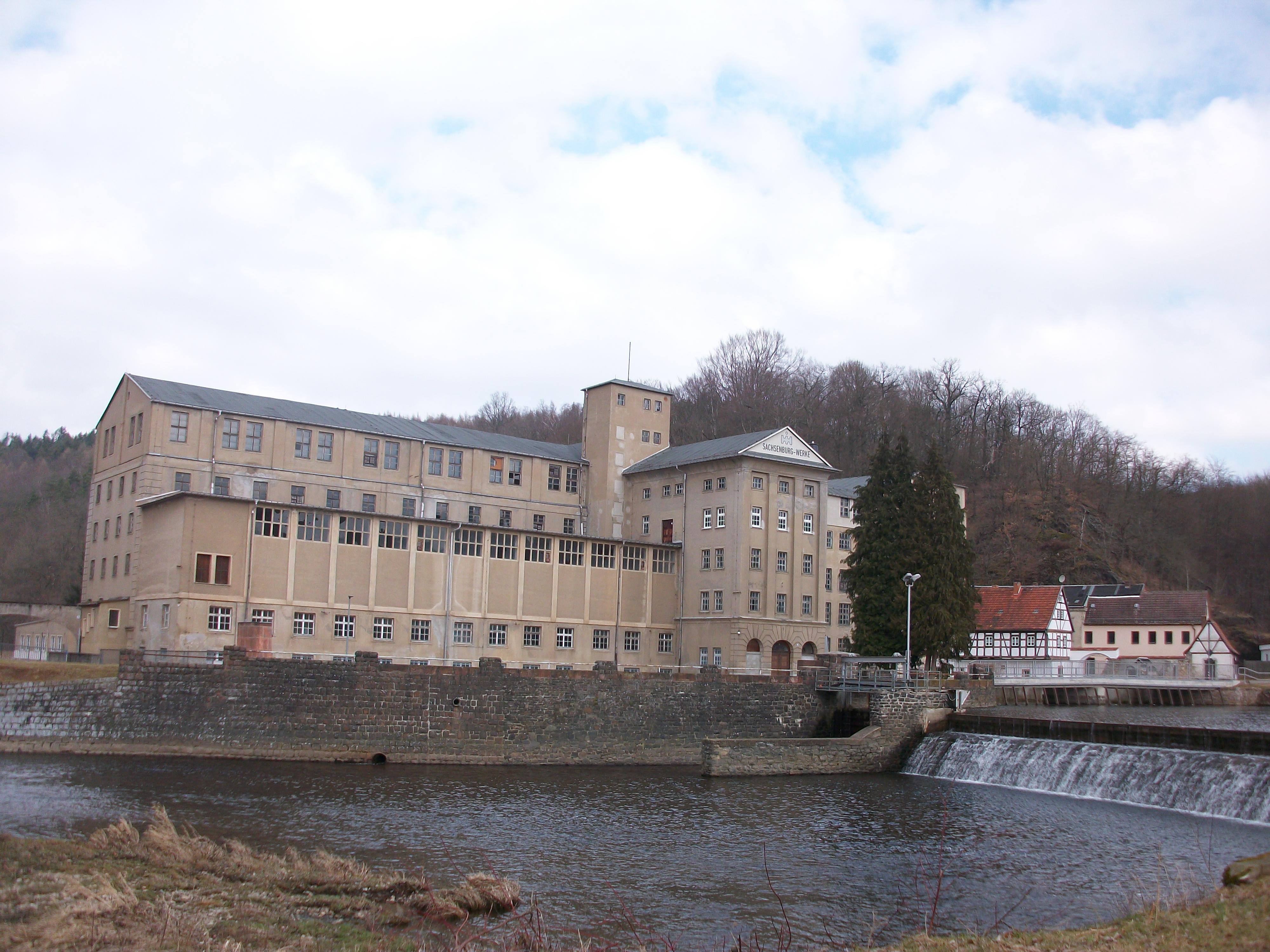 Sachsenburg-Werke (ehem. KZ Sachsenburg)